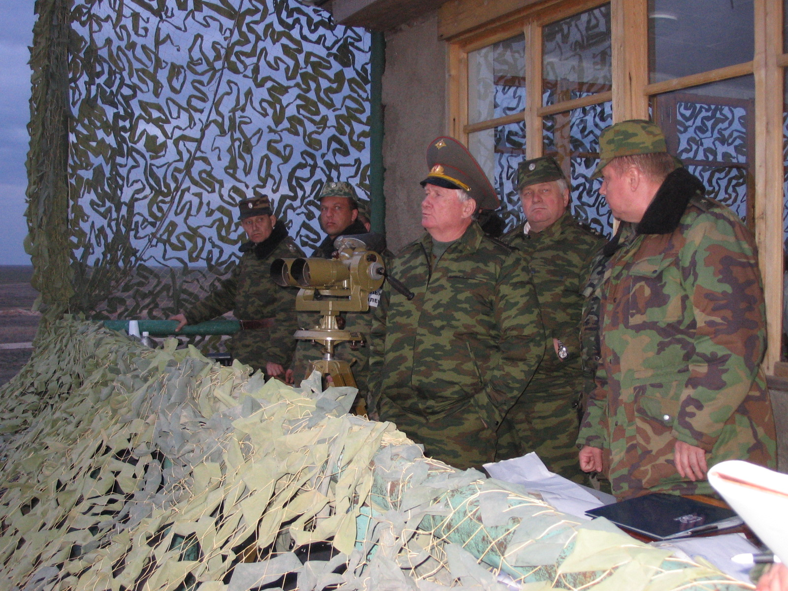 генерал армии Баранов А.И. на учениях в Кап Яре